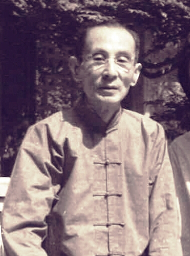 中文（中国大陆）: 赓裕钱庄董事长方作舟